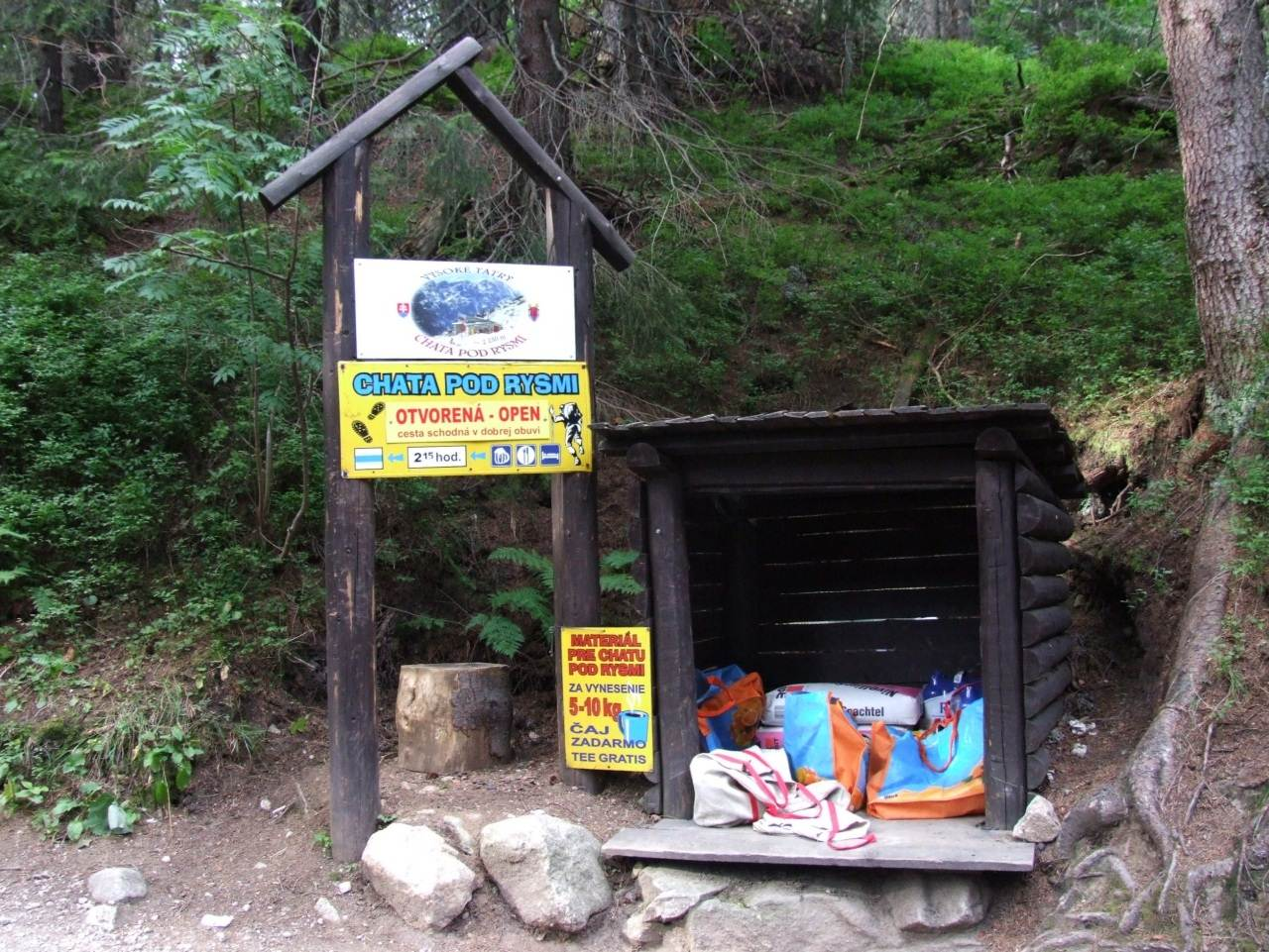 Rozdroże przy Popradzkim Stawie. Punkt pobierania ładunków do Chatki pod Rysami